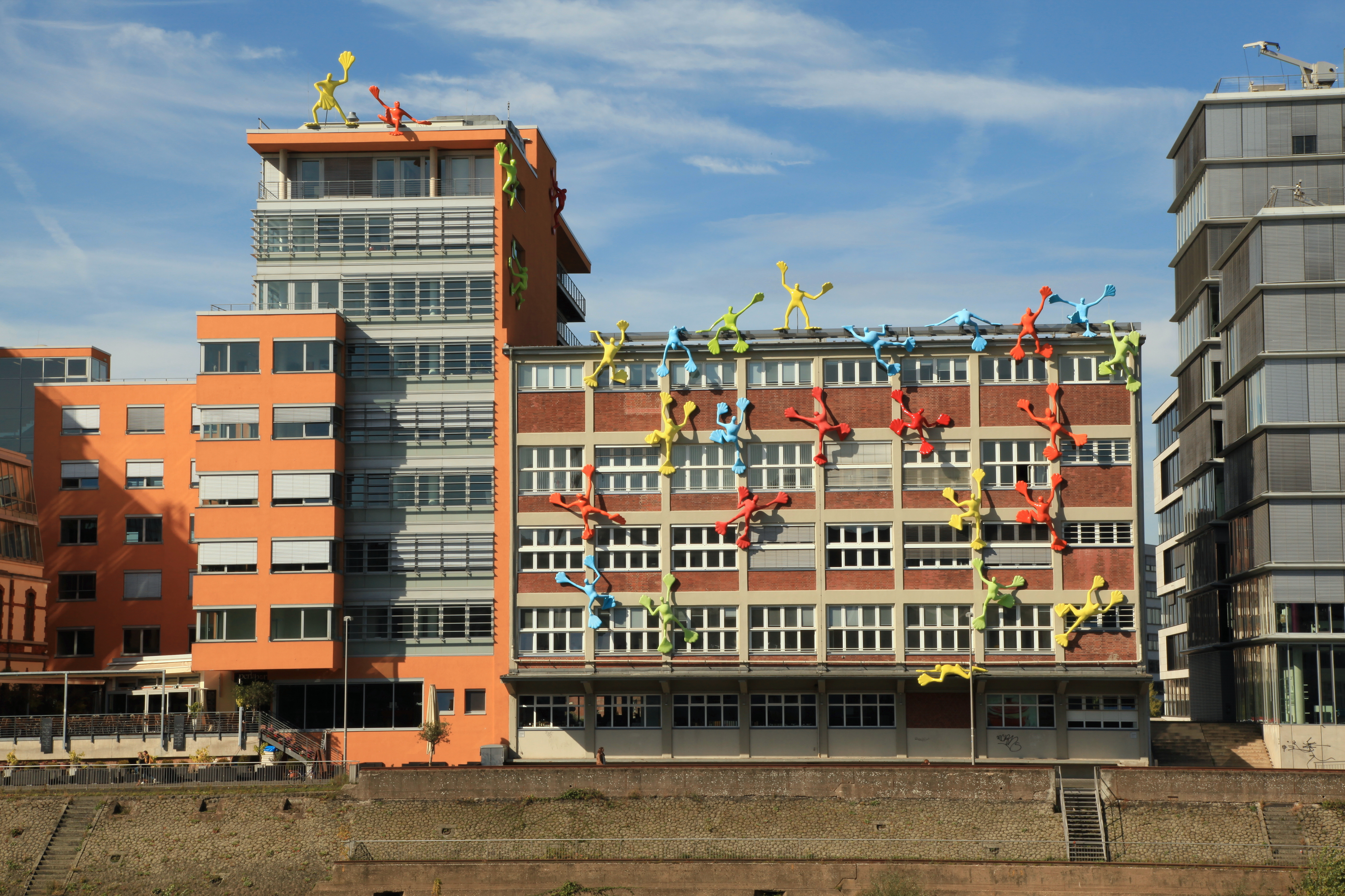 Blick von Am Handelshafen zum Neuwerk, Speditionstraße 15, und Roggendorf-Haus (Speditionstraße 15a) am Julo-Levin-Ufer in Düsseldorf